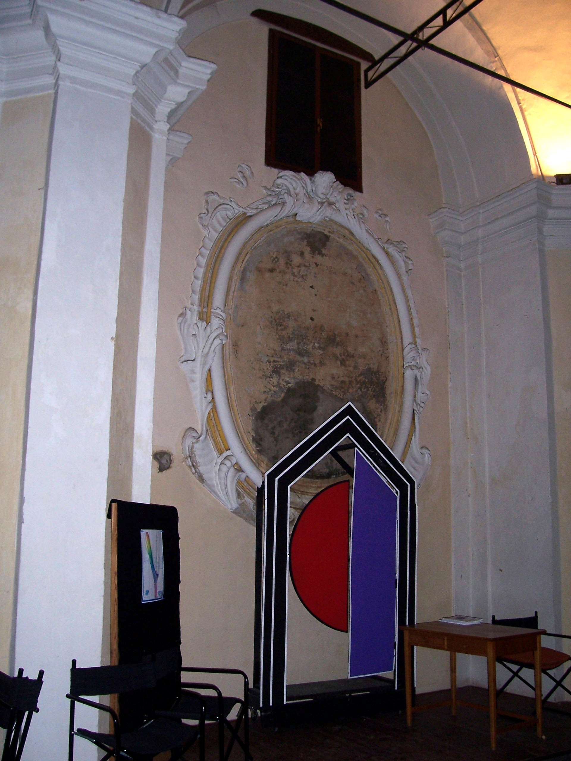 san desiderio brescia cornice.jpg